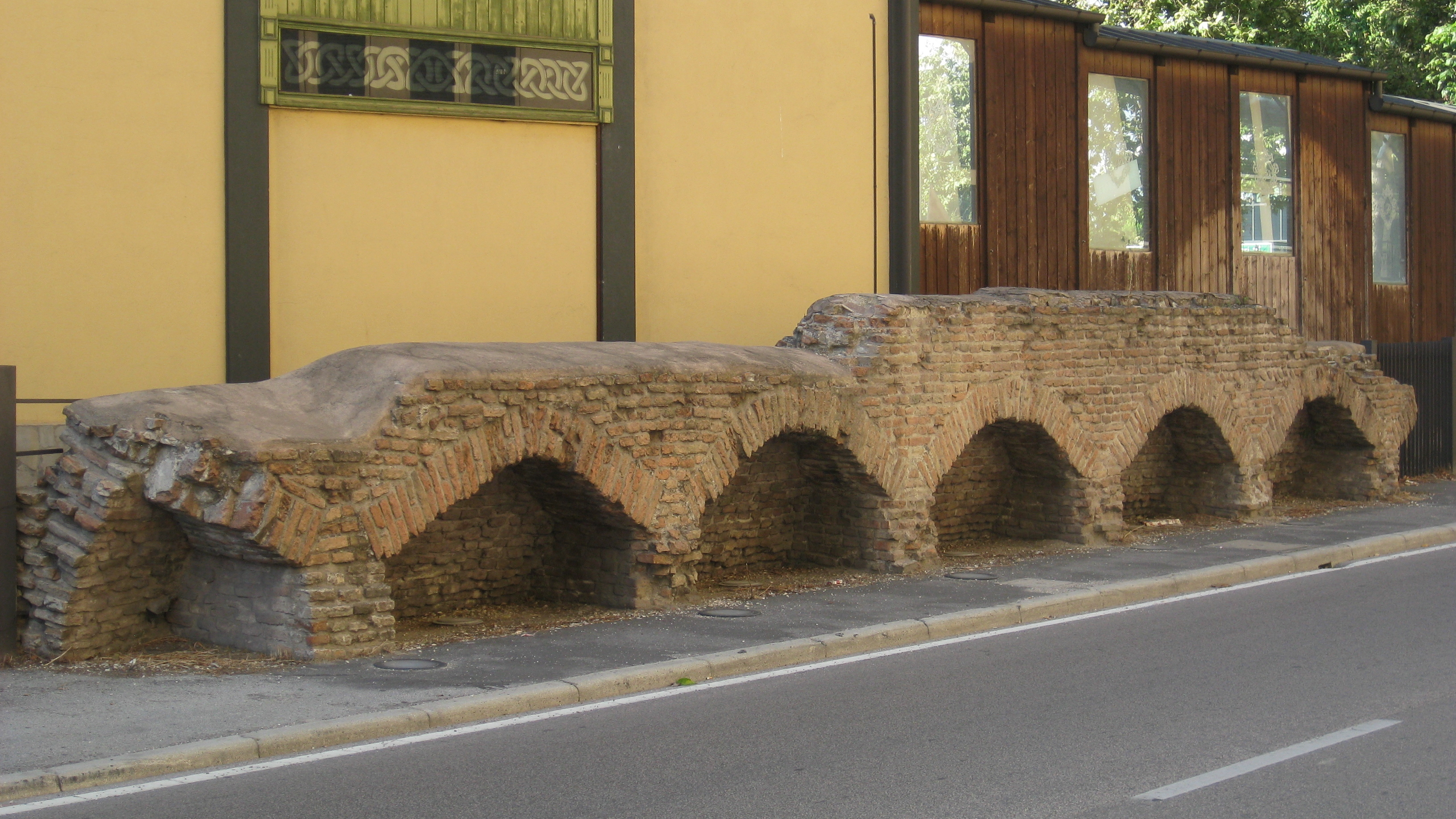 Resti delle mura di Forlì, foto propria